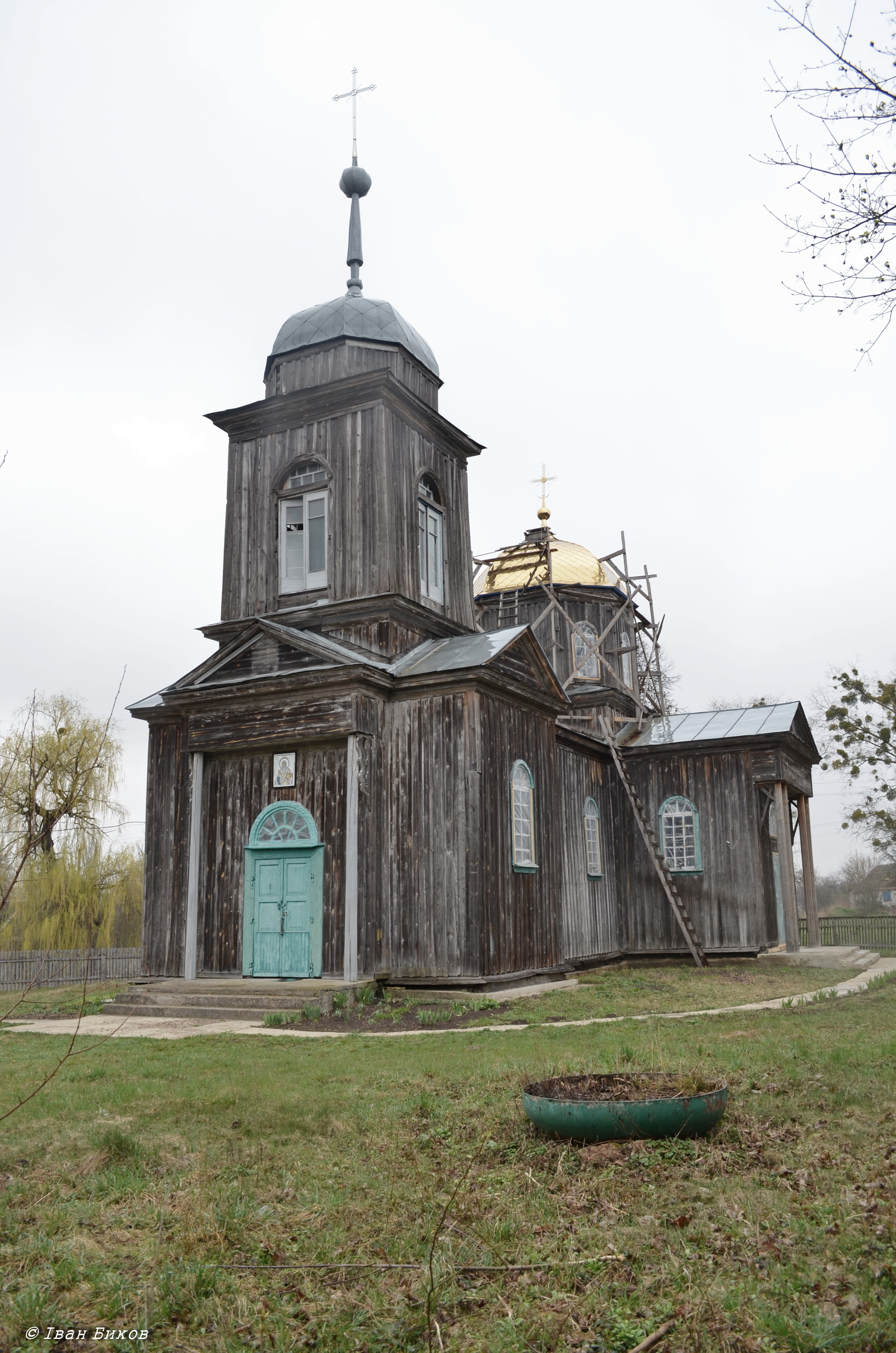 Півні. Церква Івана Златоуста. 1868 р. Класицизм в дереві